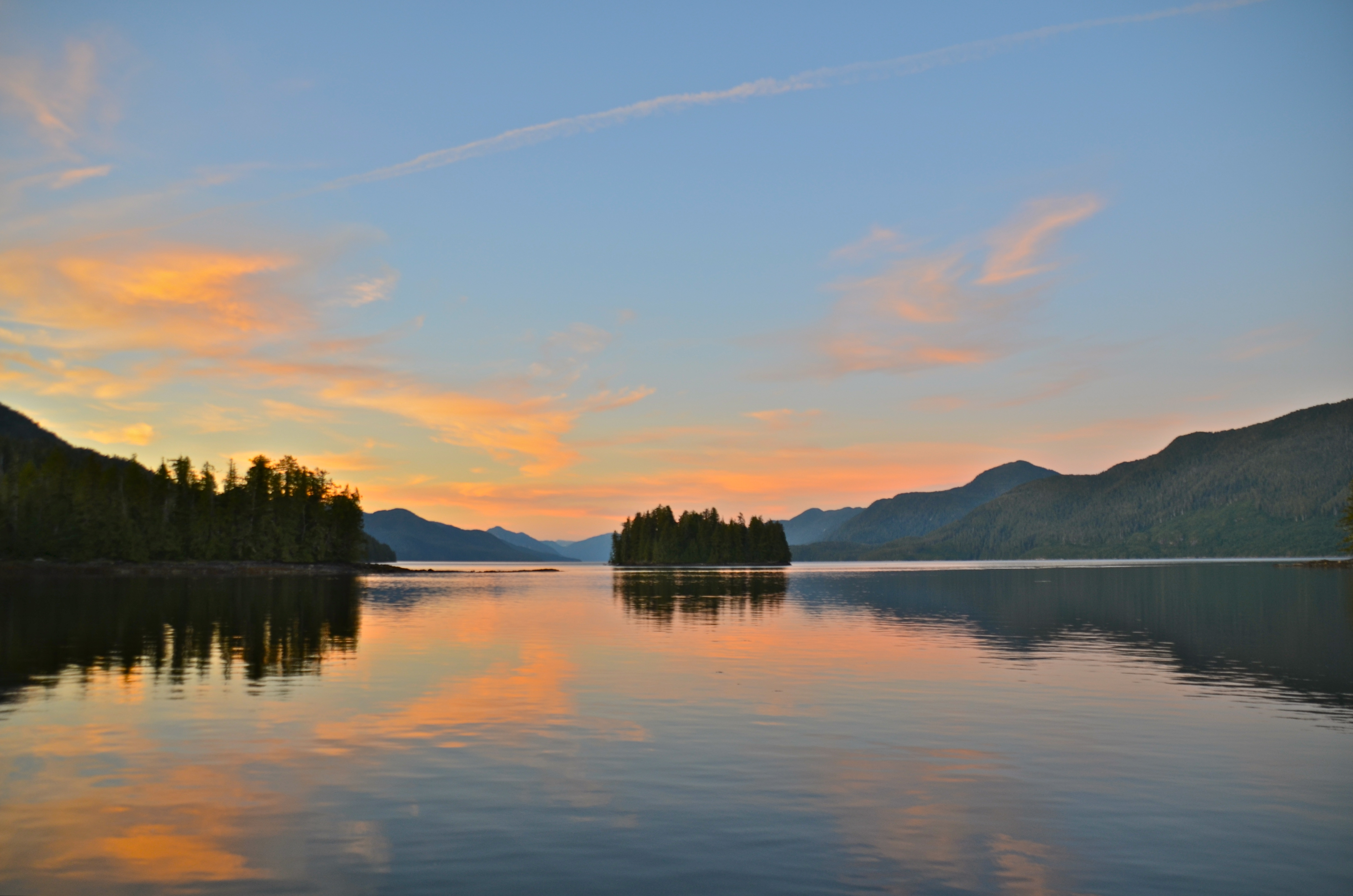 Inside Passage